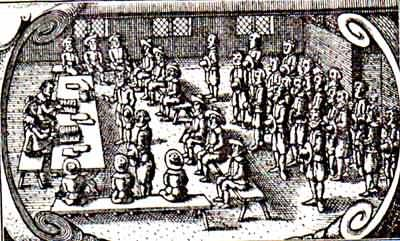 Herredsting efter stik i Glossarium Juridico-Danicum 1641. Herredstinget blev afholdt hver uge, og dets væsentligste funktion var at vidnebekræfte ejendomshandeler og aftaler m.v.